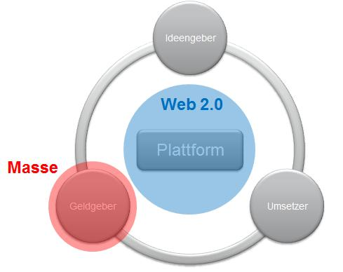 Rollenmodell für Crowdfunding